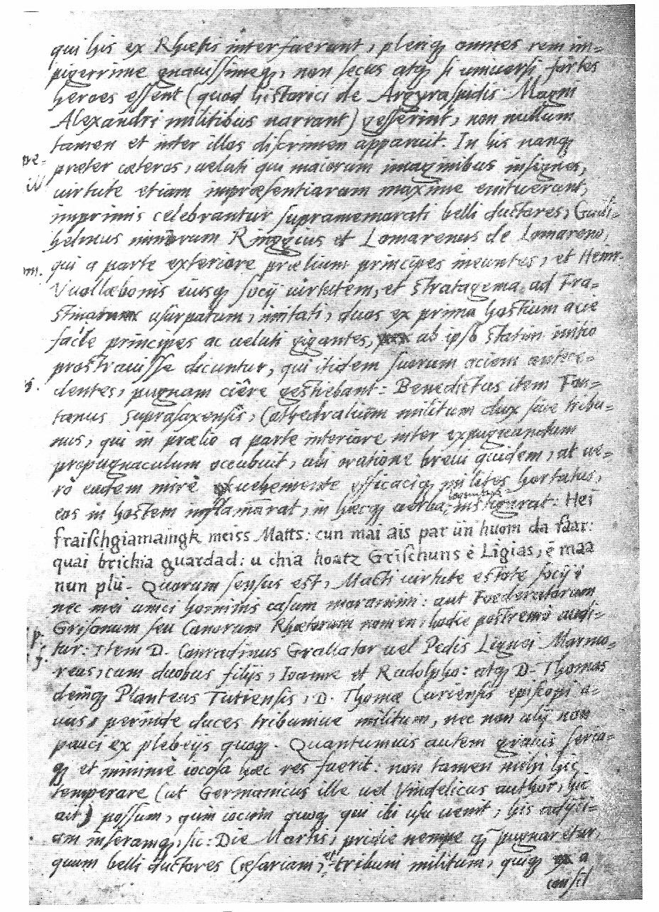 Rumantsch: La mort da Benedetg Fontana (Facsimile da l'autograf da la "Historia totius Raetiae" da Chiampel